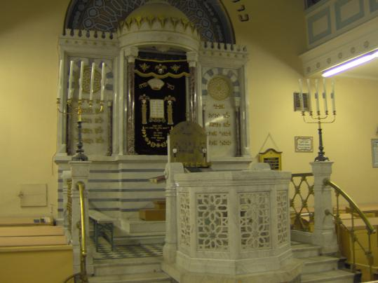 Autor: Maks Saczywko Data wykonania: 7 sierpnia 2006 Obiekt: Synagoga w Rydze (Łotwa)